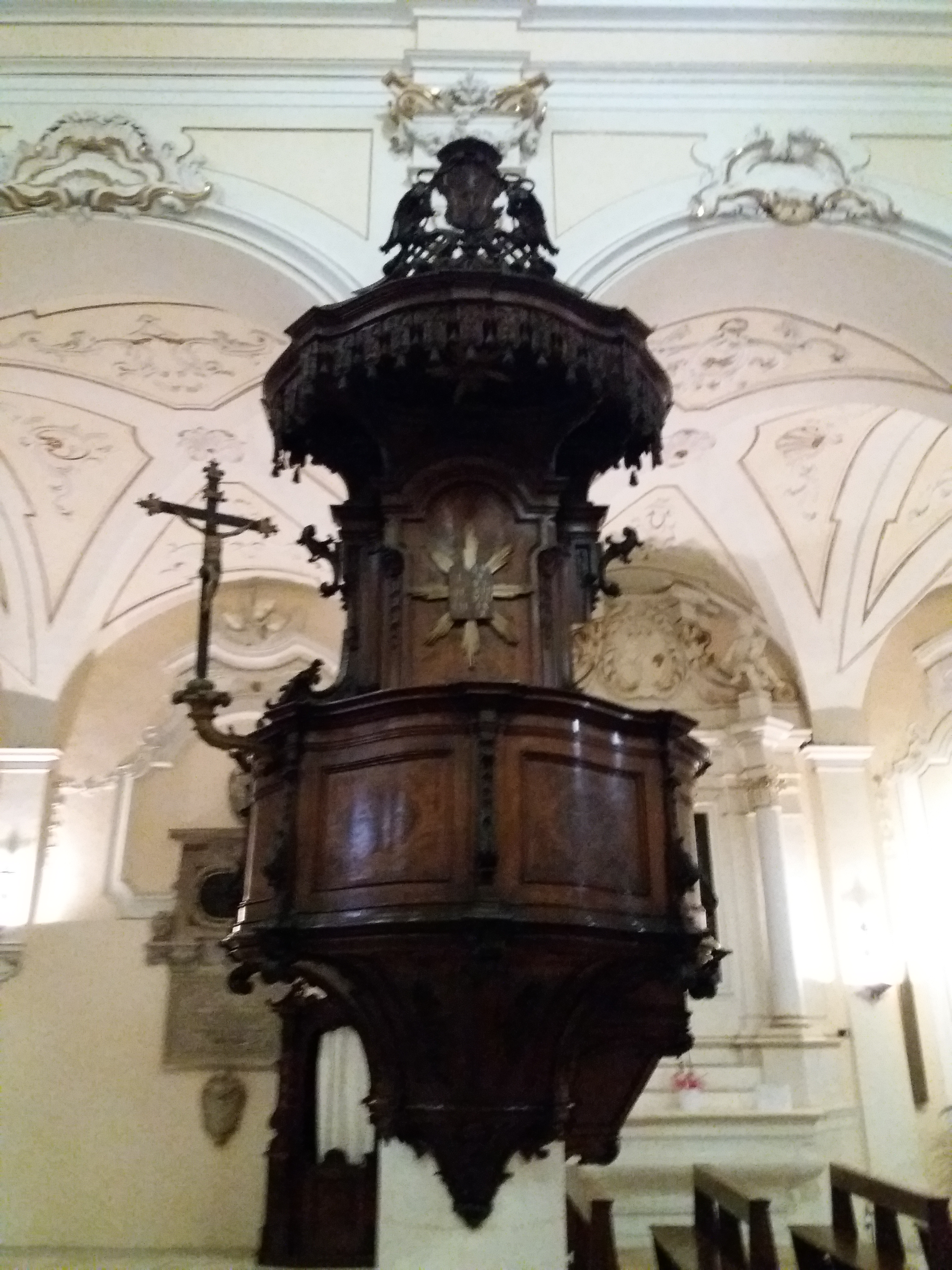 Sulmona: Cattedrale di San Panfilo